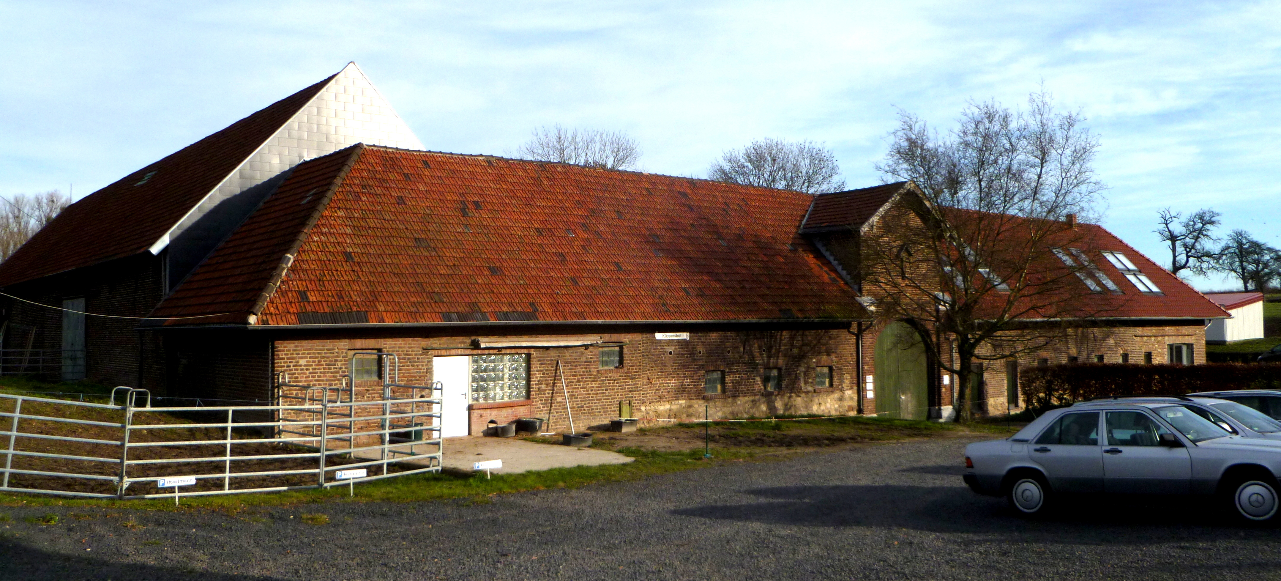 Baudenkmal in Aachen-Richterich